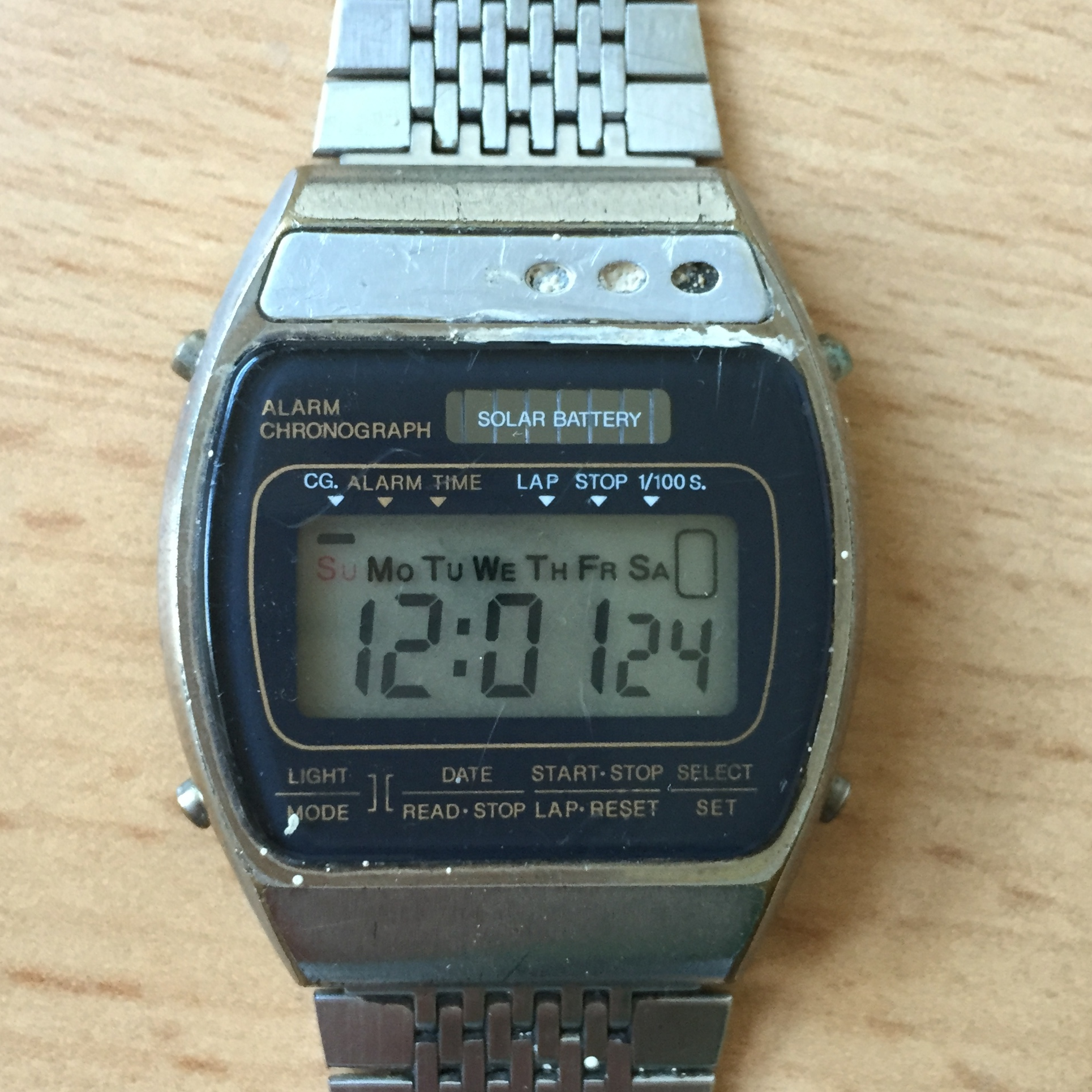 Digital-Armbanduhr Timeton von 1979